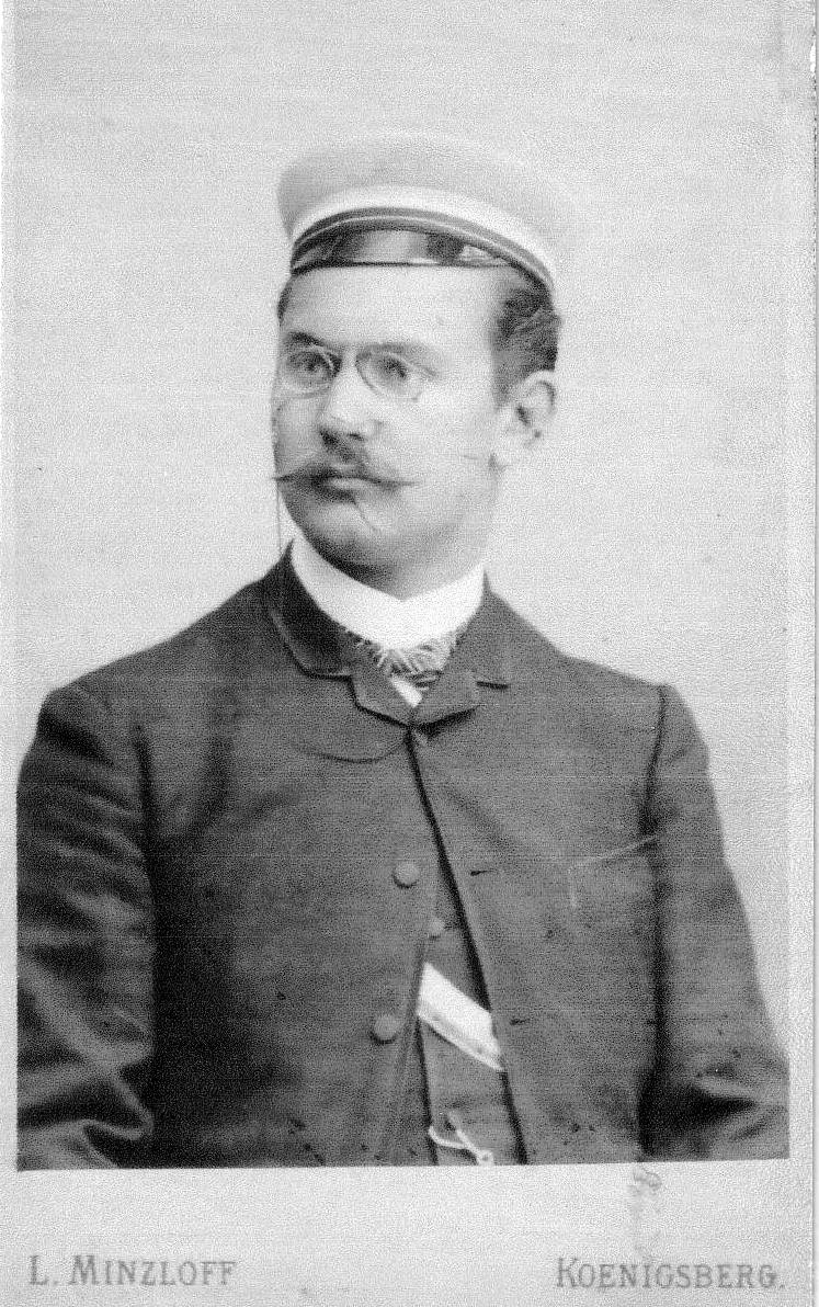 Fotografie von Wilhelm Kuhr (1865-1914) als Angehöriger des Corps Masovia Königsberg